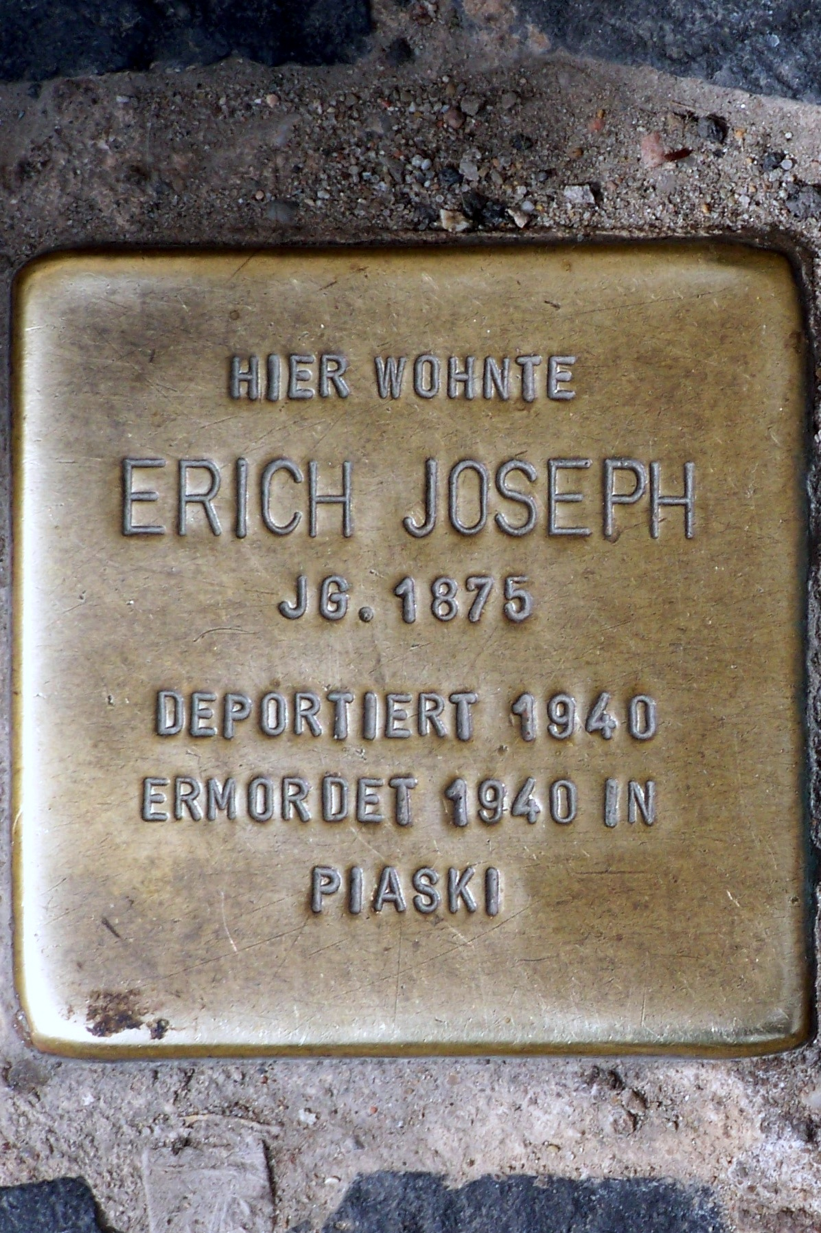 Stolperstein für Erich Joseph in Stralsund.